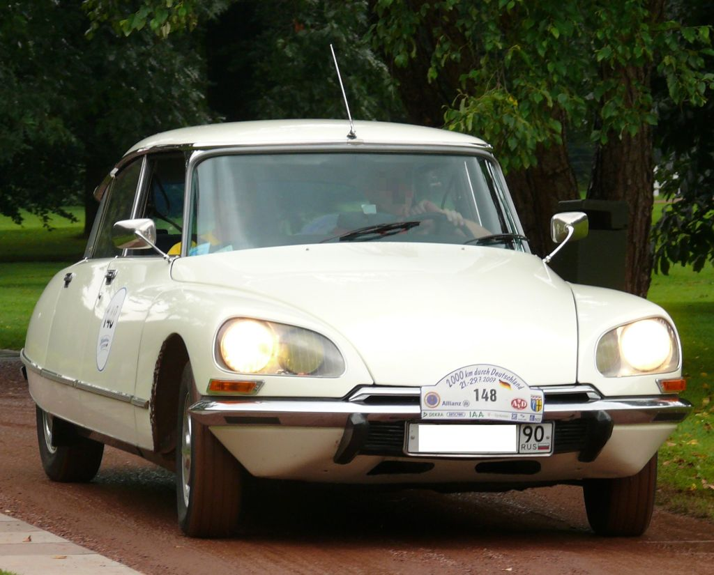 Citroën DS 23 Pallas